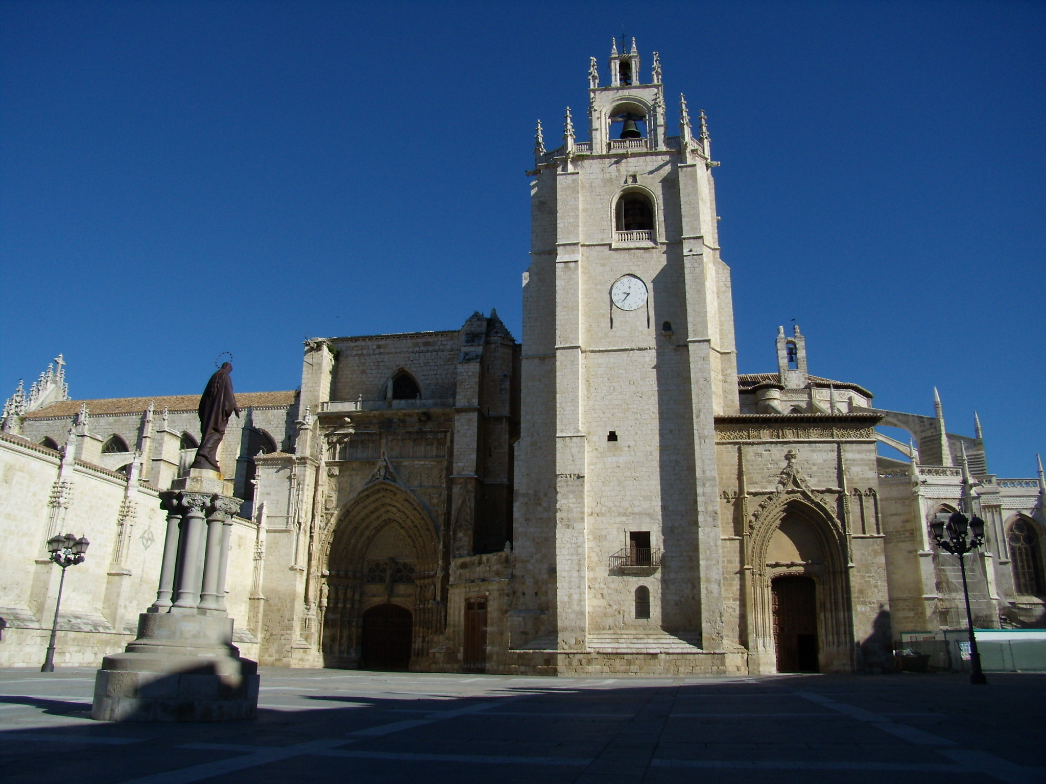 Catedral de San Antolín de Palencia. Fachada de la plaza de la Inmaculada.